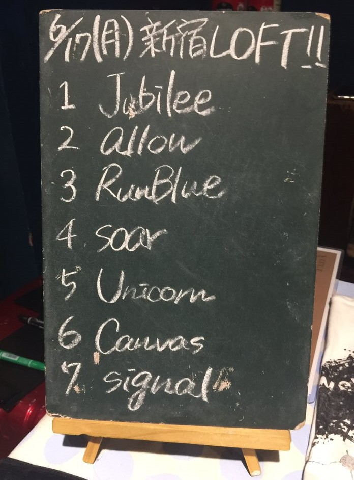 amiinAセトリボード